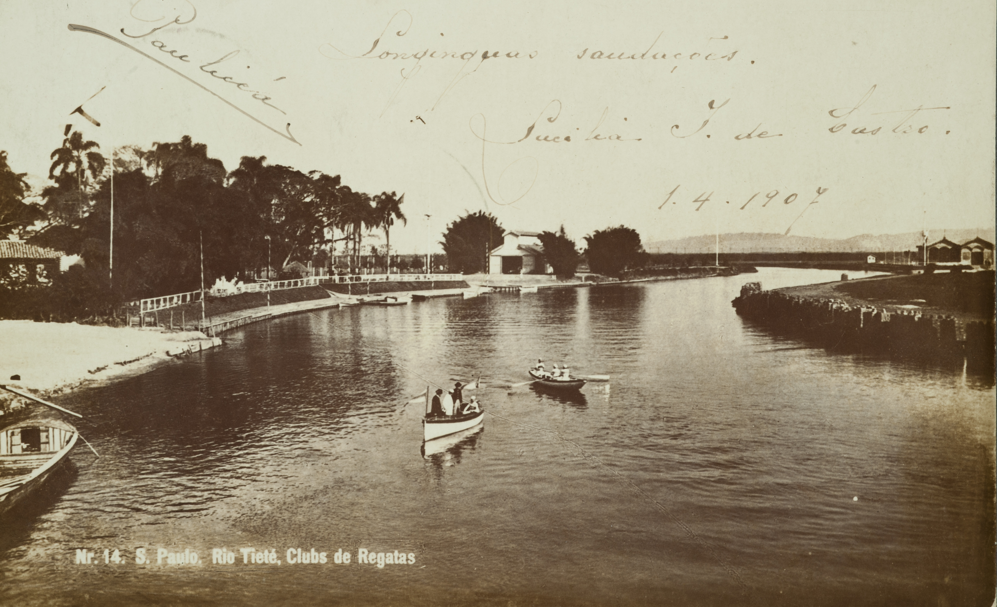 Obra que integra o acervo do Museu Paulista da USP.